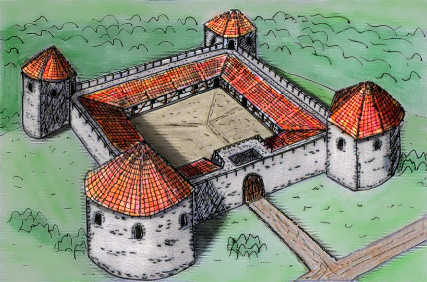 Rekonstruktionsversuch des spätantiken Kastells von Visegrád-Gizellamajor nach einer Schautafel am Grabungsgelände.